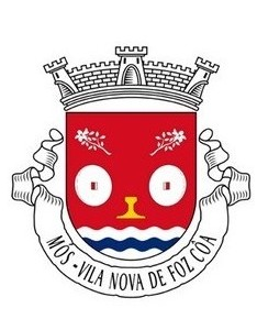 Brasão da Freguesia de Mós